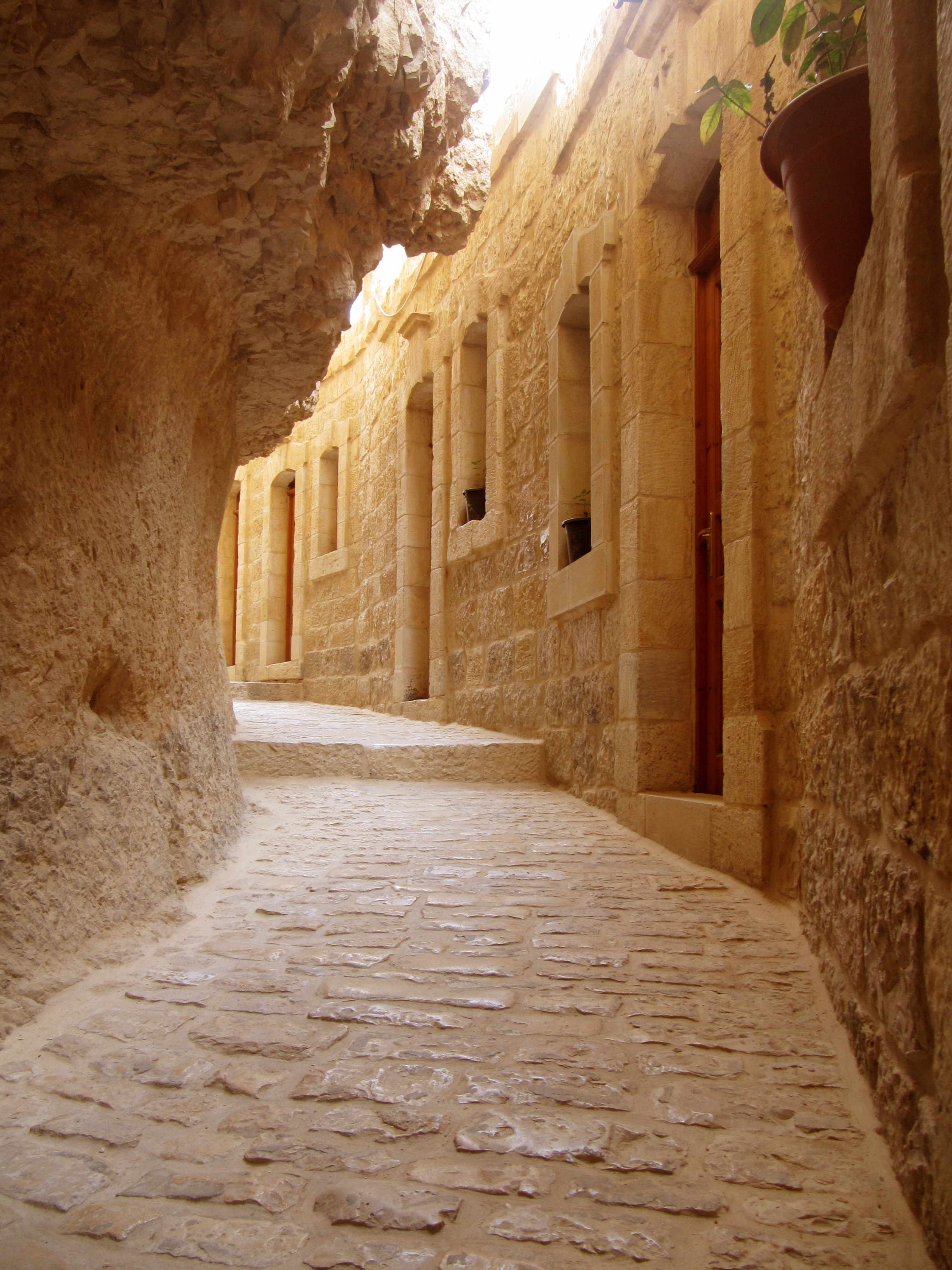 Jericho (more details in the photo's title) יריחו (מידע נוסף בשם הקובץ)